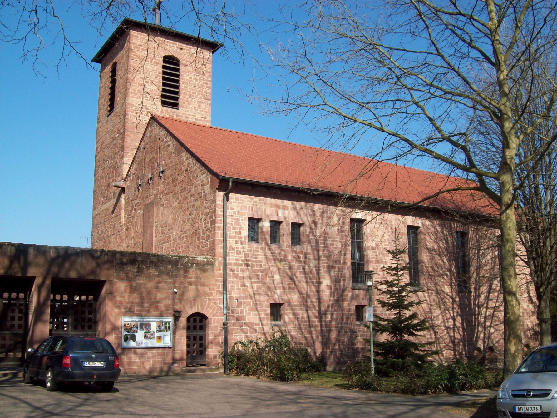 Pauluskirche Aschaffenburg (Aussenansicht)